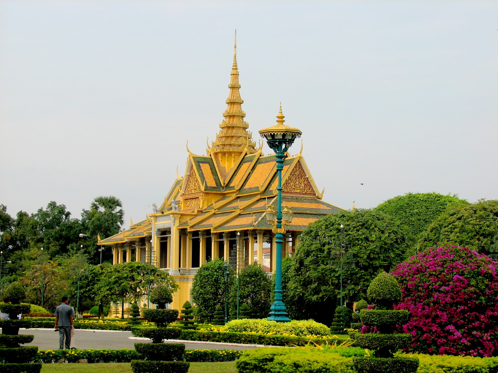 Royal Palace including gardens and tombs in pagoda, Phnom Penh Cambodia הארמון המלכותי שעיר פנום פן בירת קמבודיה. הארמון נמצא במתחם סגור הכולל מבנים רבים גנים ופגודות שהינם קברים של בני המשפחה המלכותית